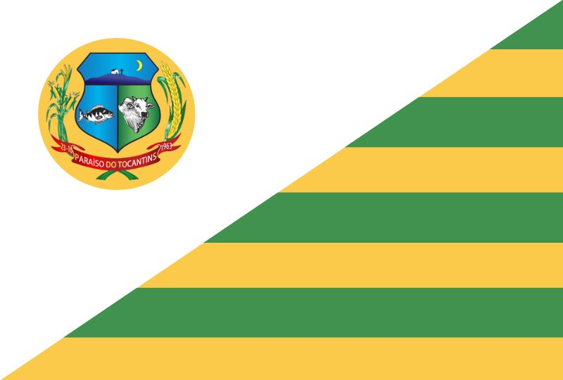 De acordo com a Lei brasileira em Propriedade Industrial (Lei 9.279 de 14 de maio de 1996), Capítulo IV, Artigo 191, os símbolos oficiais brasileiros são de domínio público porque eles podem ser copiados e reproduzidos sem qualquer permissão do governo brasileiro ou qualquer outro órgão, a menos que eles estejam sendo copiados ou reproduzidos com intenções sujas.